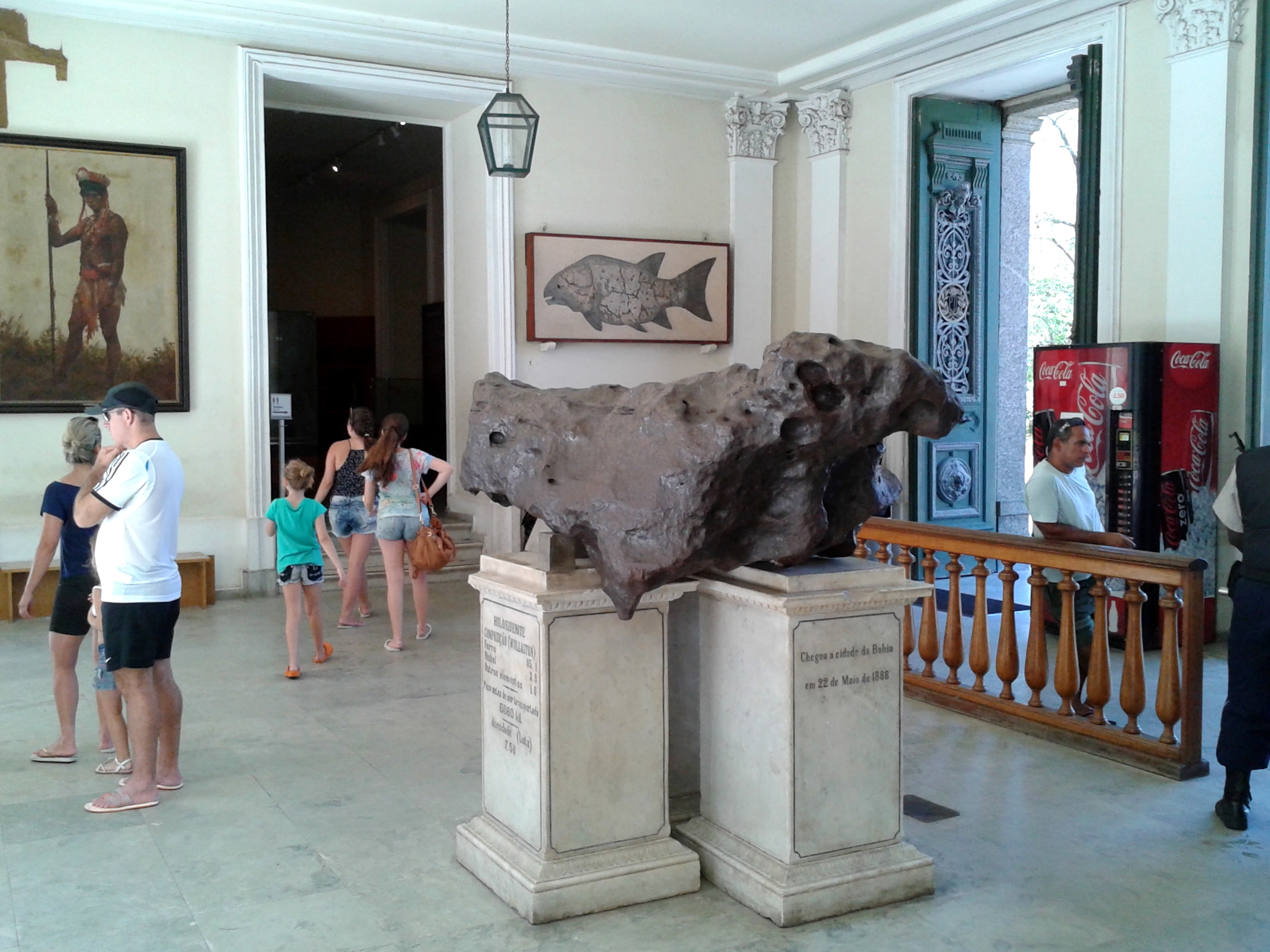 Saguão do Museu Nacional da UFRJ, com o Meteorito do Bendegó ao centro. Rio de Janeiro, RJ, Brasil